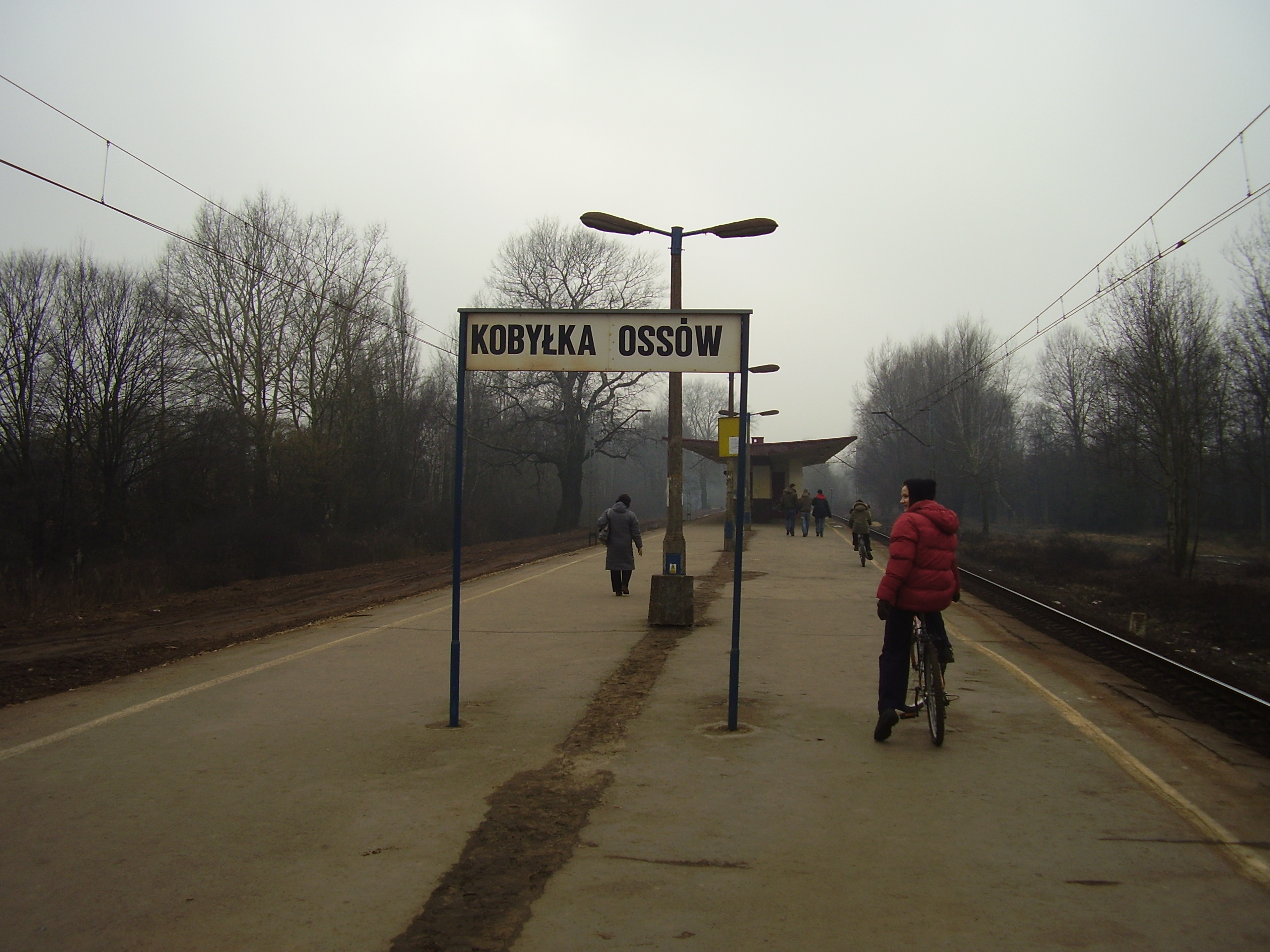 Stacja kolejowa Kobyłka Ossów. Widok w kierunku Warszawy Wileńskiej.